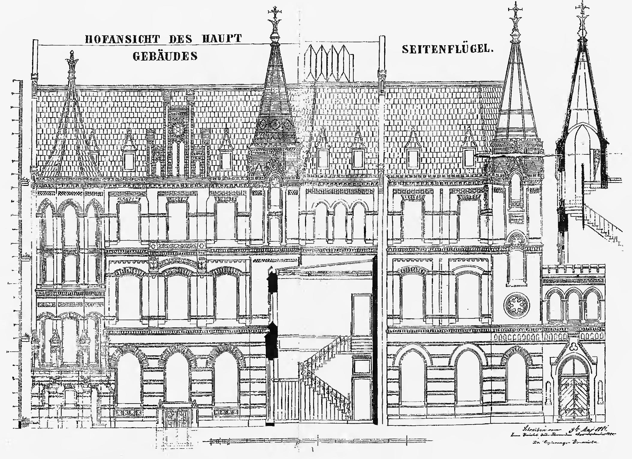 Projekt elweacji tylnej urzędu pocztowego w Toruniu.